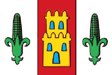 Bandeira de Zas